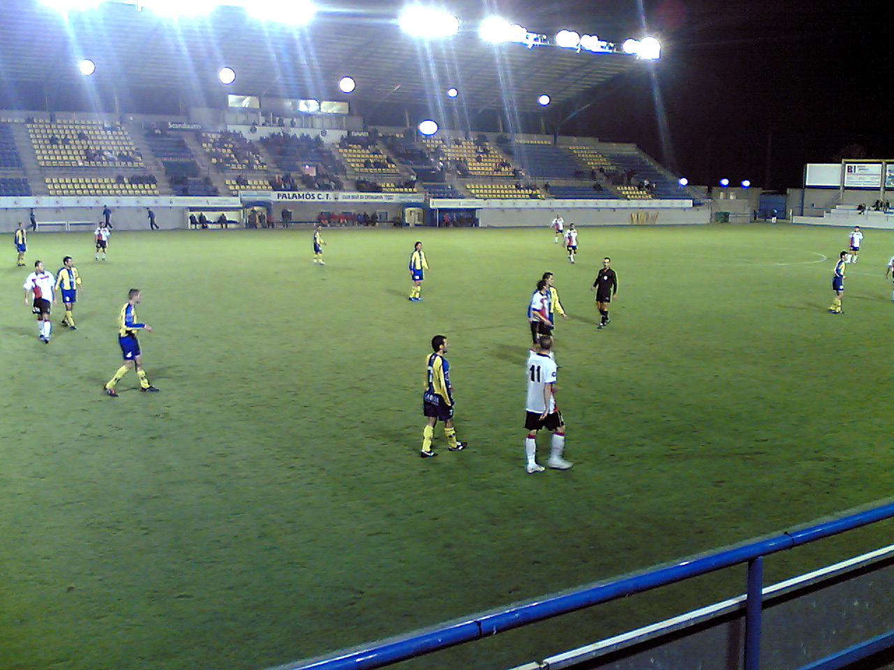 Partit de Tercera divisió al Nou Municiapl de Palamós. Temporada 2008-09